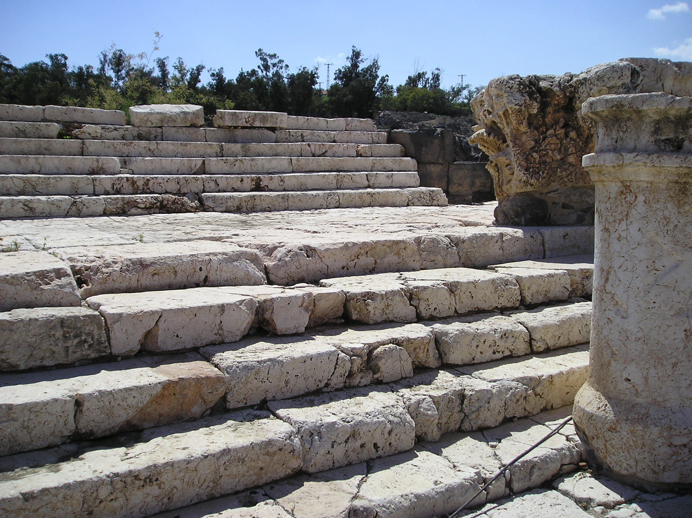 Bet Szean (stanowisko archeologiczne - Scytopolis) w Izraelu. Schody z rzymskiej świątyni.